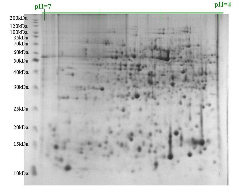 ג'ל חלבונים דו ממדי, הפרדה אופקית (ציר X) על פי הנקודה האיזואלקטרית. הפרדה אנכית (ציר Y) על פי משקל מולקולרי. דגימה מצמחי מלפפון מאוכלסים בפטרייה פתוגנית. (באדיבות מיכל שרון)